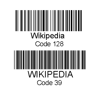 Wikipédia traduit sous forme de code barres suivant le code 128 et le code 39.